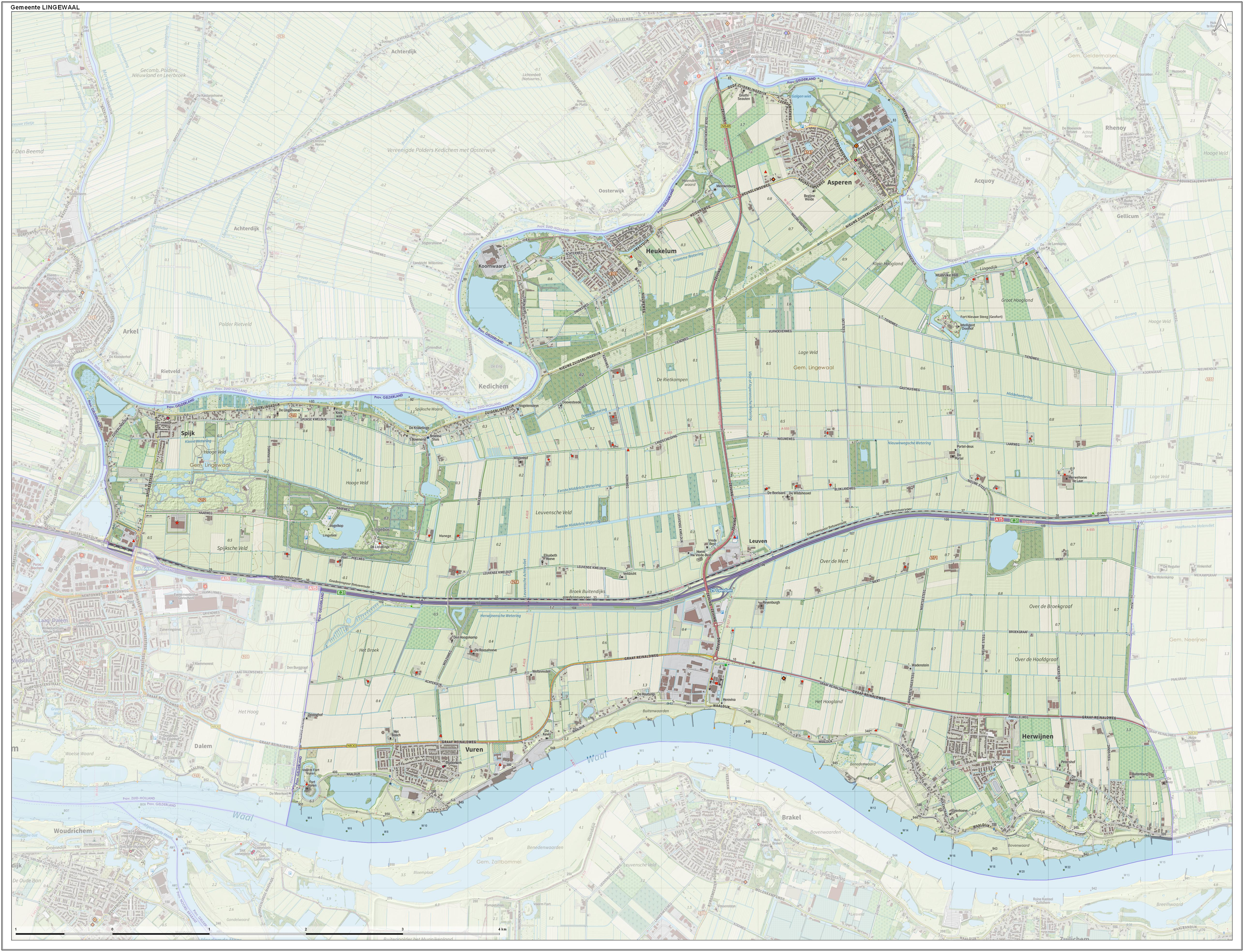 Topografische gemeentekaart. Resolutie: 400 pixels/km. Kaartbeeld samengesteld uit de open geodata van de Top10NL en Top25namen (Kadaster), Creative Commons-BY licentie. Gebouwvlakken uit open geodata BAG extract. Wegen uit de OpenStreetMap, OpenStreetMap community. Reliëfschaduw uit de Actuele Hoogtekaart AHN2. Samenstelling en kleurenschema: Jan-Willem van Aalst, met QGIS. Zie ook de Legenda.